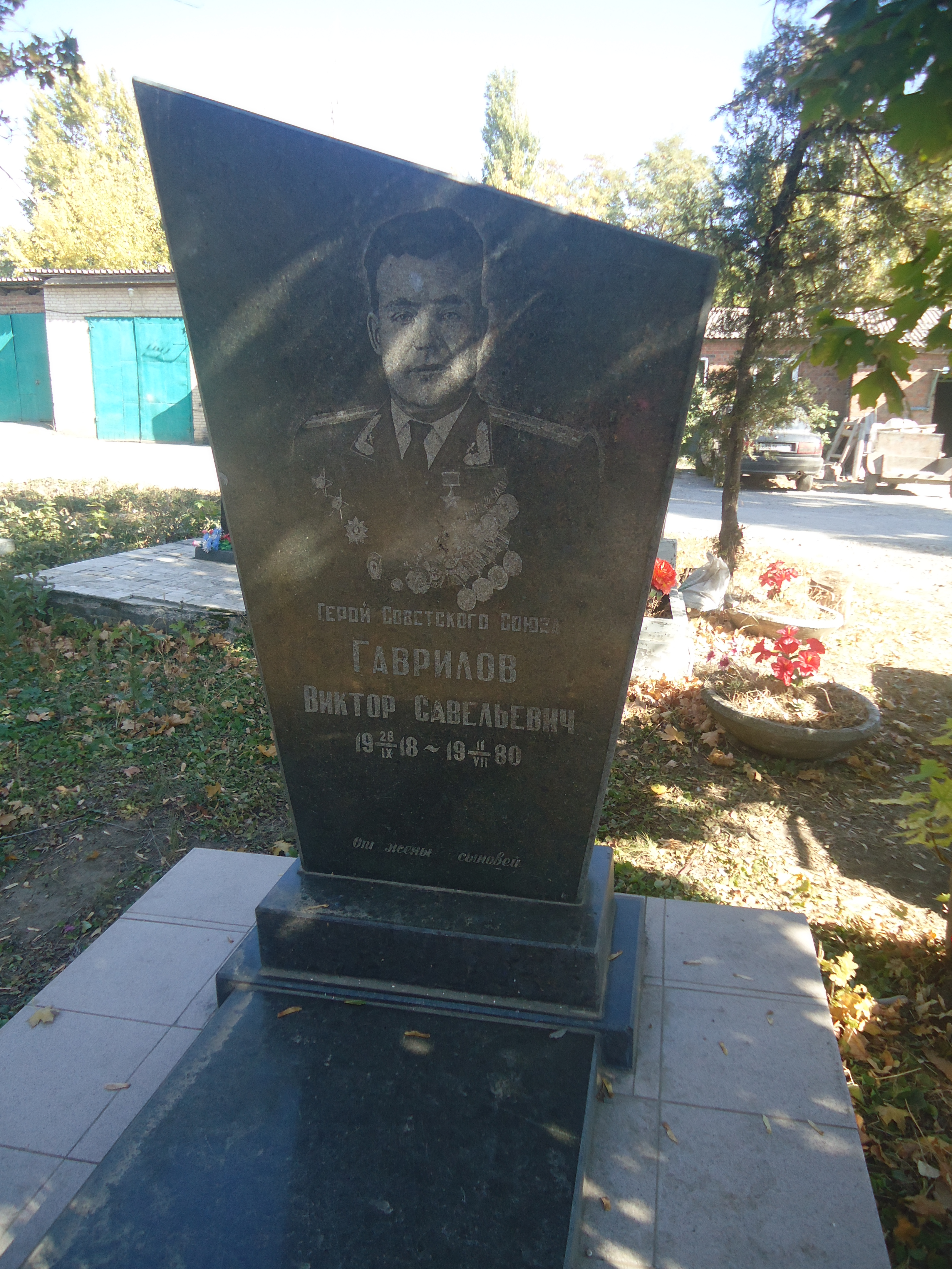 Надгробный памятник на могиле Героя Советского Союза Гаврилова Виктора Савельевича